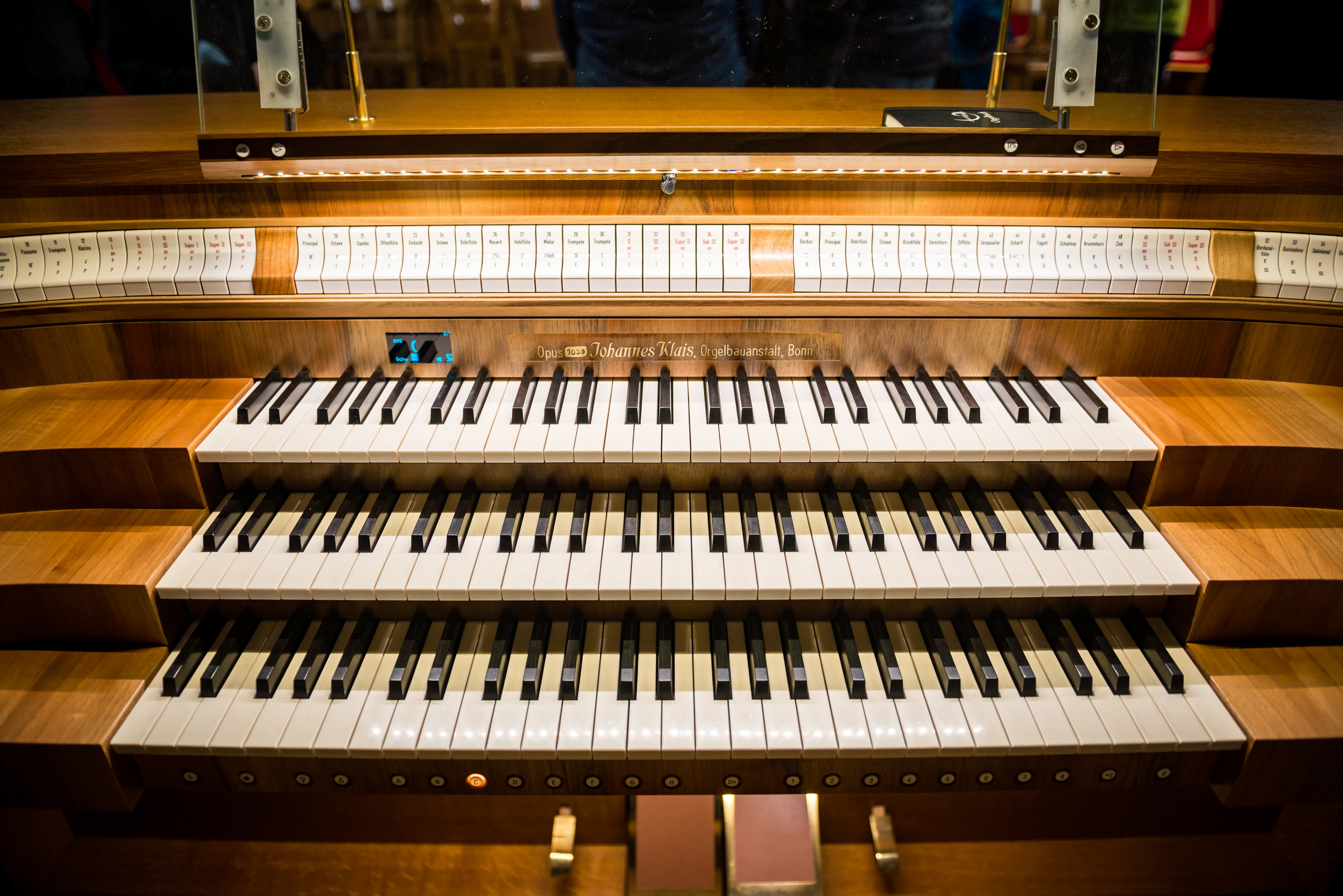 Neuer Spieltisch von Orgelbau Romanus Seifert & Sohn, Kevelaer.